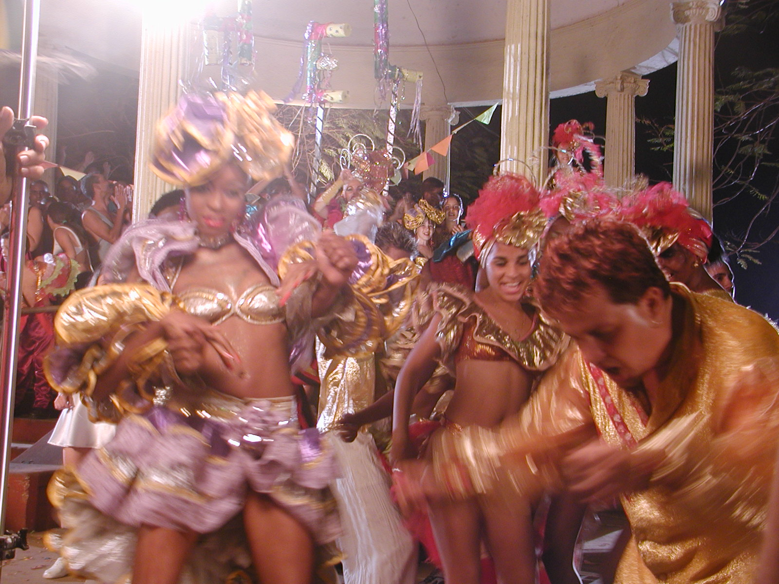 Actividad cultural en el Centro del Pueblo